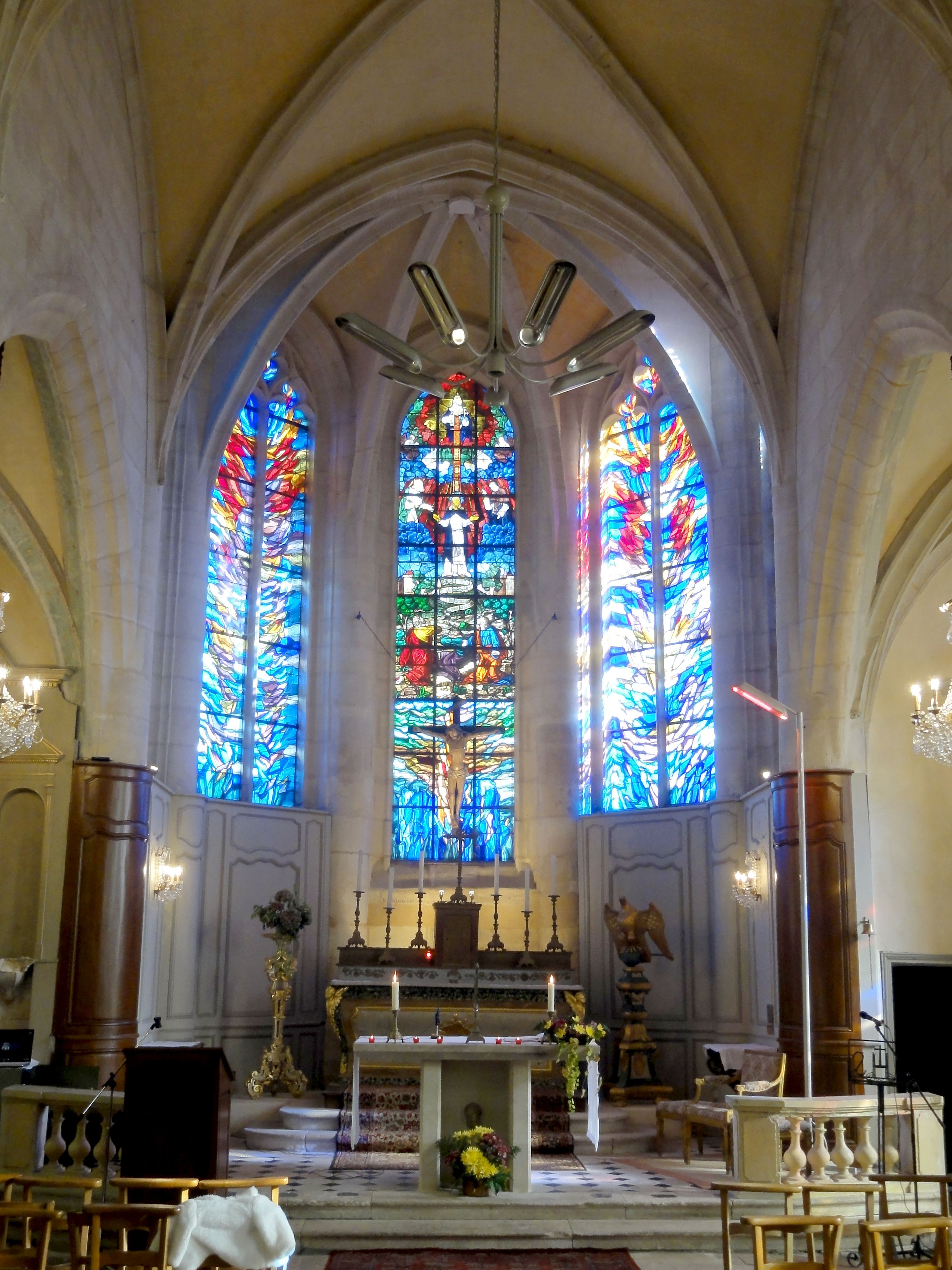 Abside.